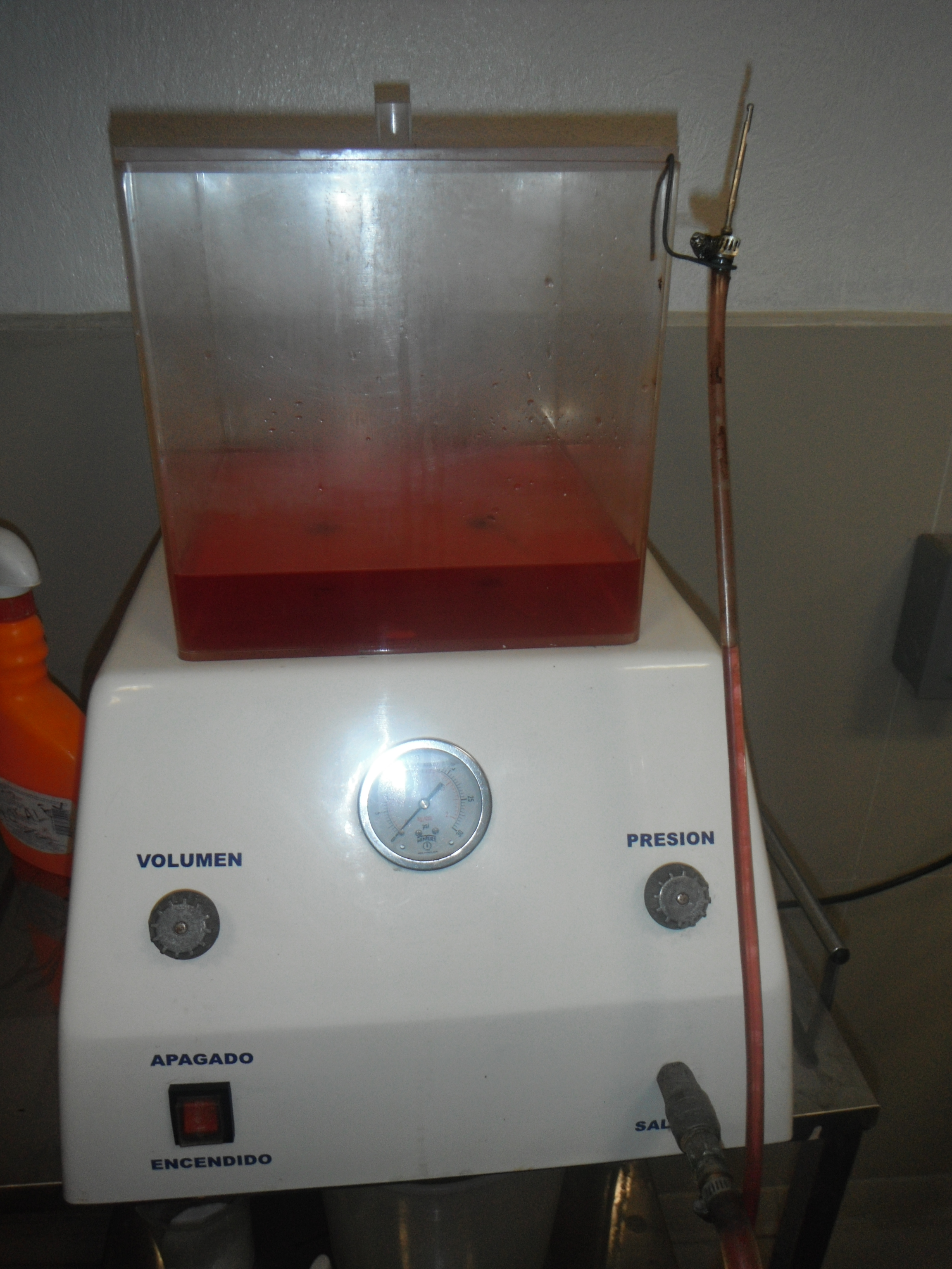 BOMBAINYECTORA para embalsamar